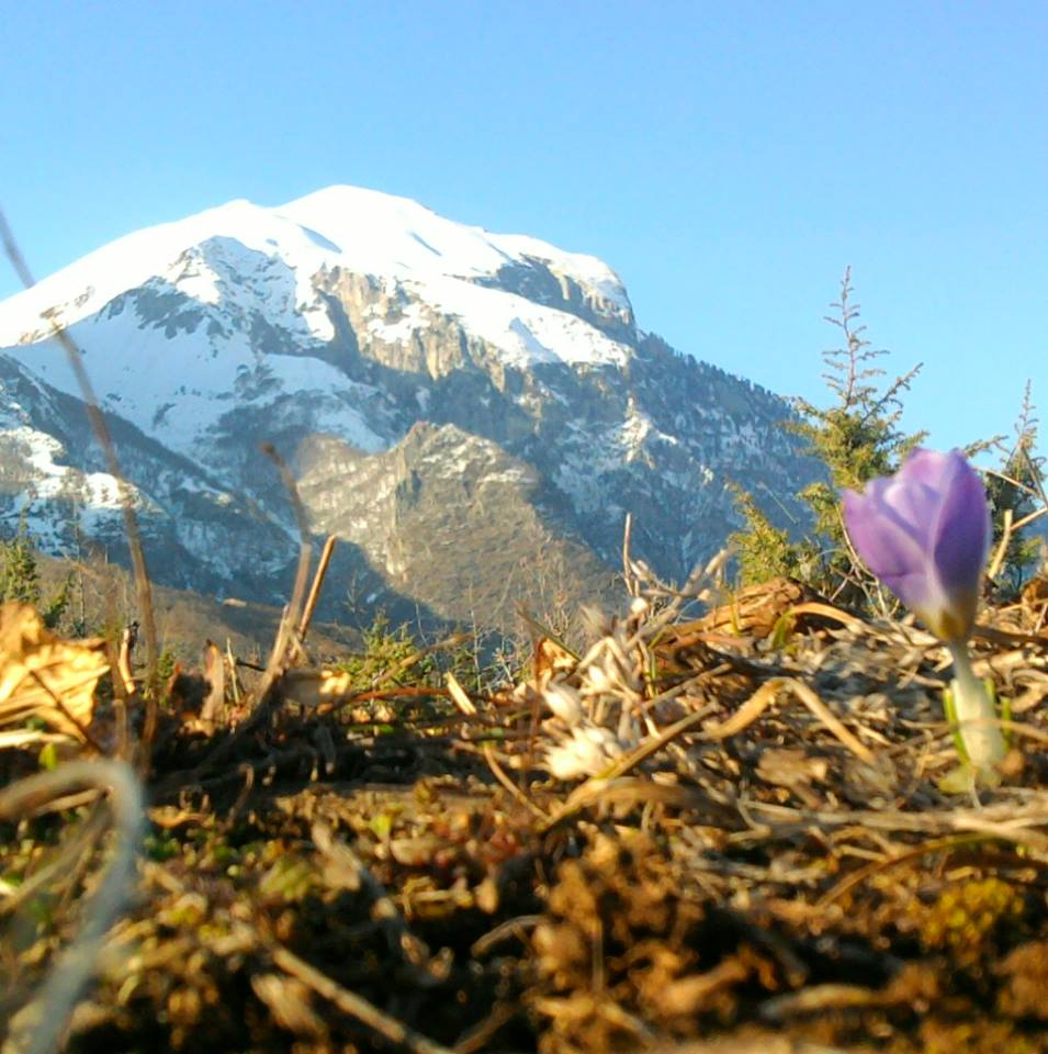 Pamje nga mali i Shkelzenit (2407 m)